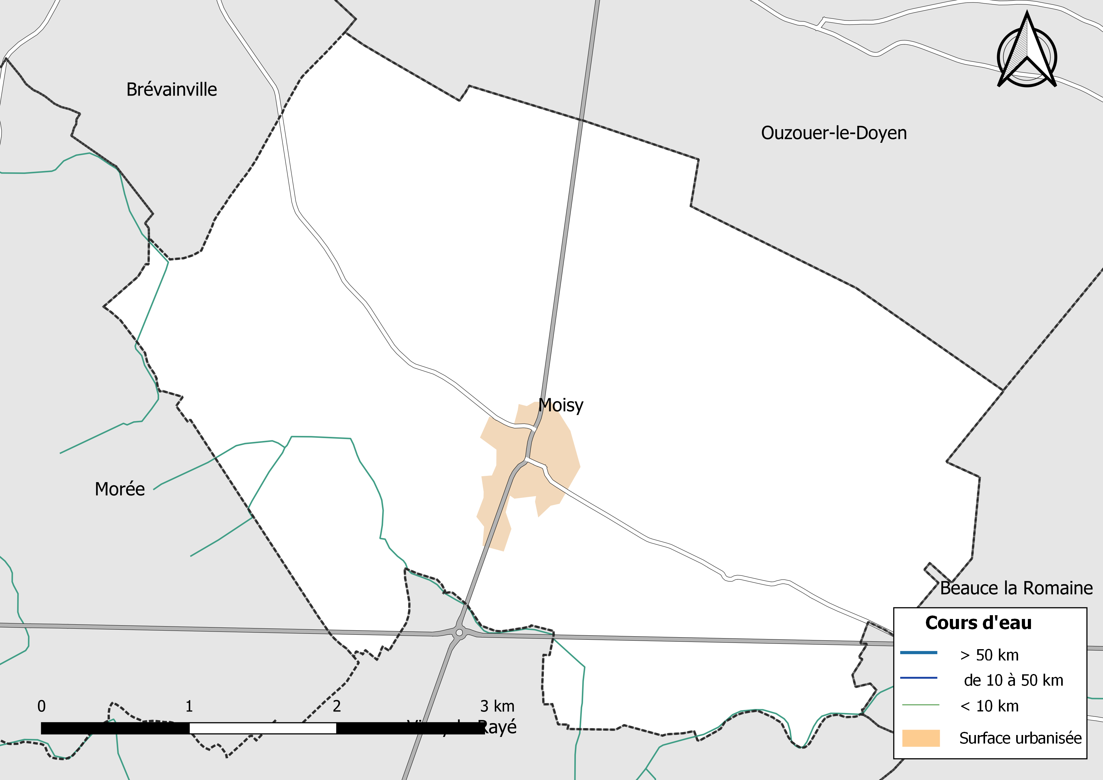 Carte du réseau hydrographique de la commune de Moisy (Loir-et-Cher, France).